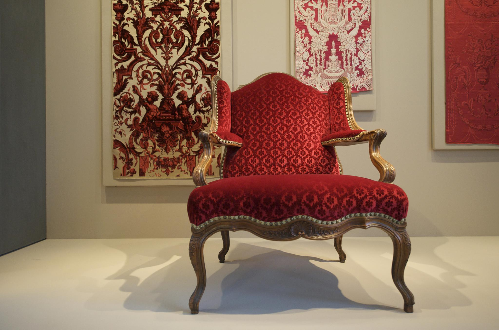 Fauteuil à oreilles, France, vers 1750, noyer sculpté, velours, Musée des arts décoratifs, Paris, France.